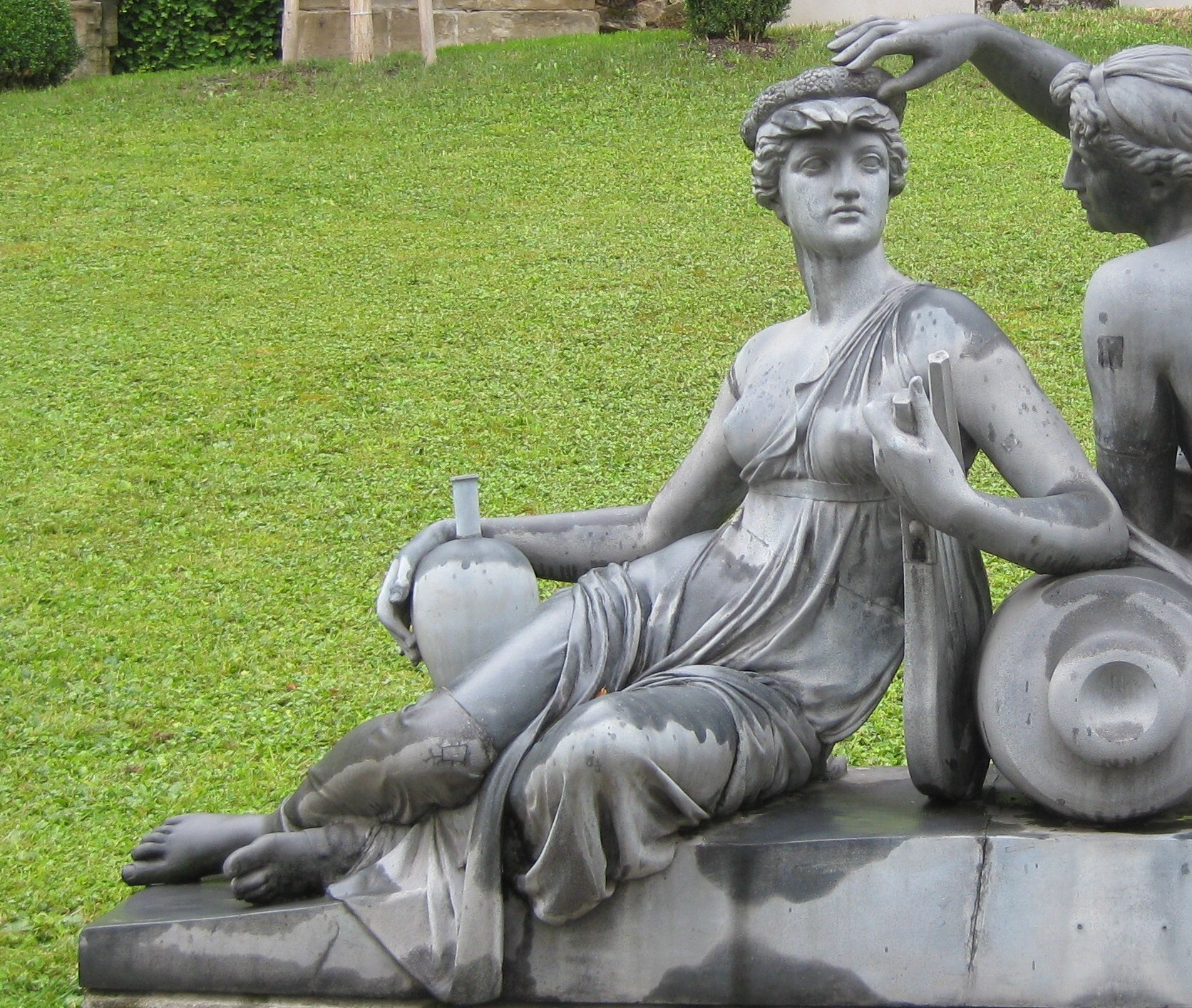 Johann Heinrich Dannecker: Wasser- und Wiesennymphe, Detail: Wassernymphe. Zinkguss von NN (um 1933), Stuttgart, Städtisches Lapidarium